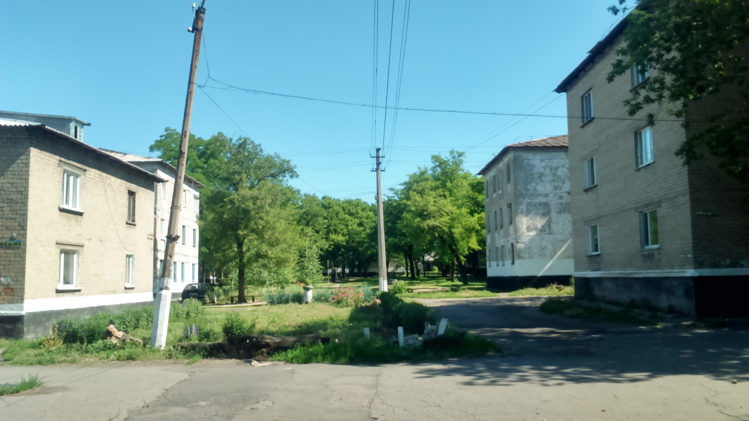 Водя́нське — селище міського типу Донецької області, підпорядковане Білицькому, розташоване на річці Водяна за 93 км від Донецька. Відстань до райцентру становить близько 6 км і проходить автошляхом місцевого значення.